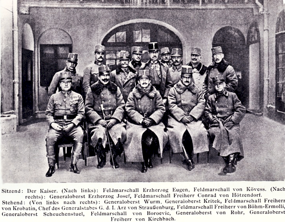 Der Kaiser und seine Heerführer 1918